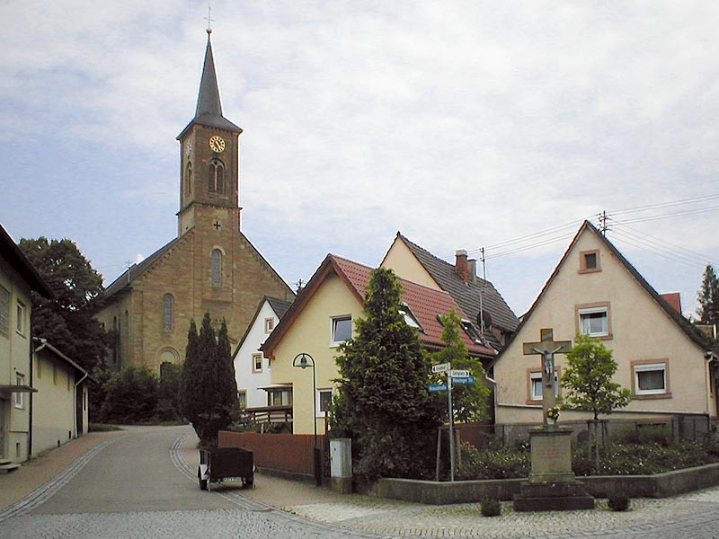 Katholische Kirche, erbaut 1852, in Östringen-Tiefenbach